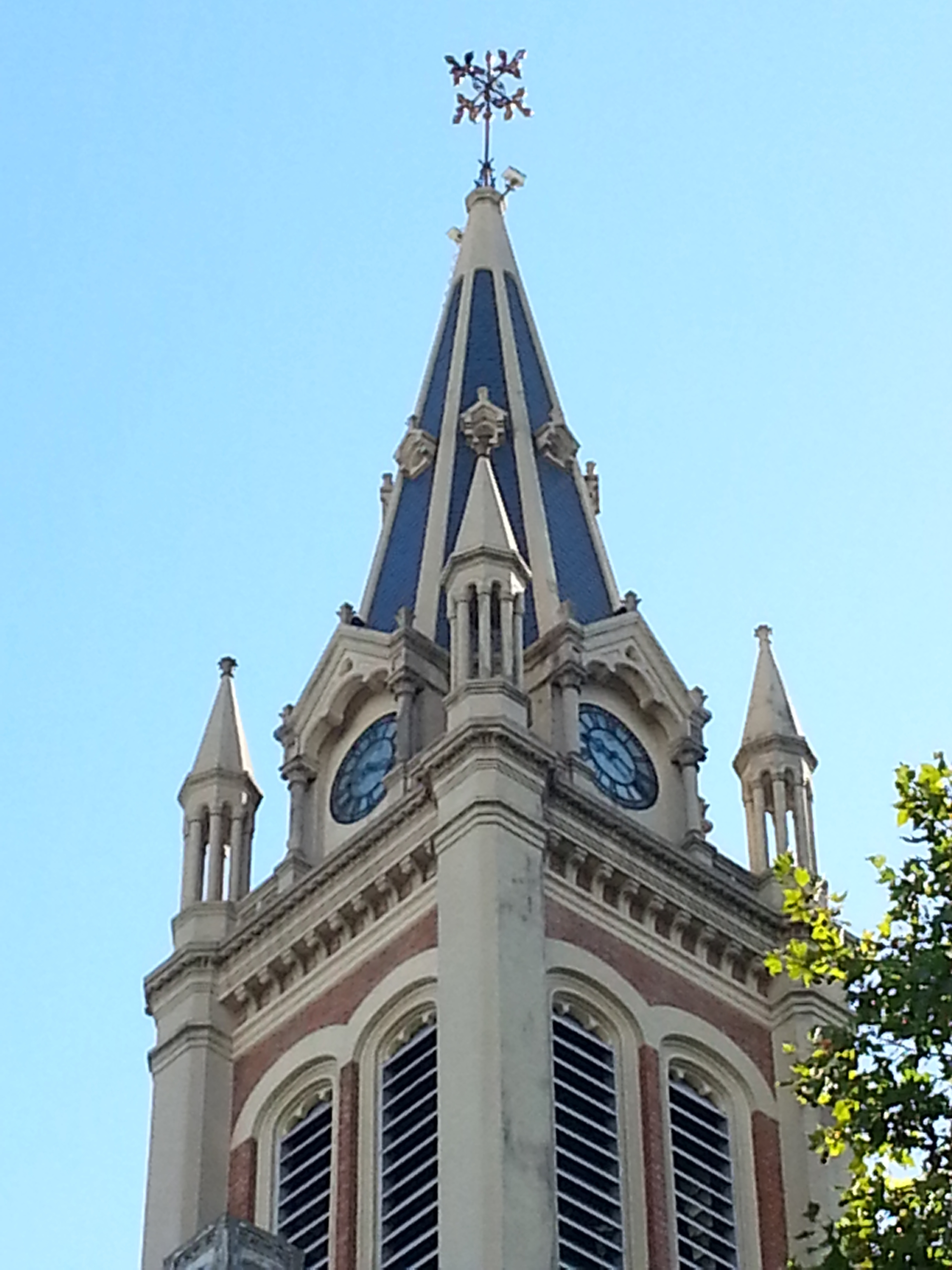 La torre campanario de la Basílica María Auxiliadora y San Carlos continúa en un chapitel que remata a 64 m de altura con una cruz.